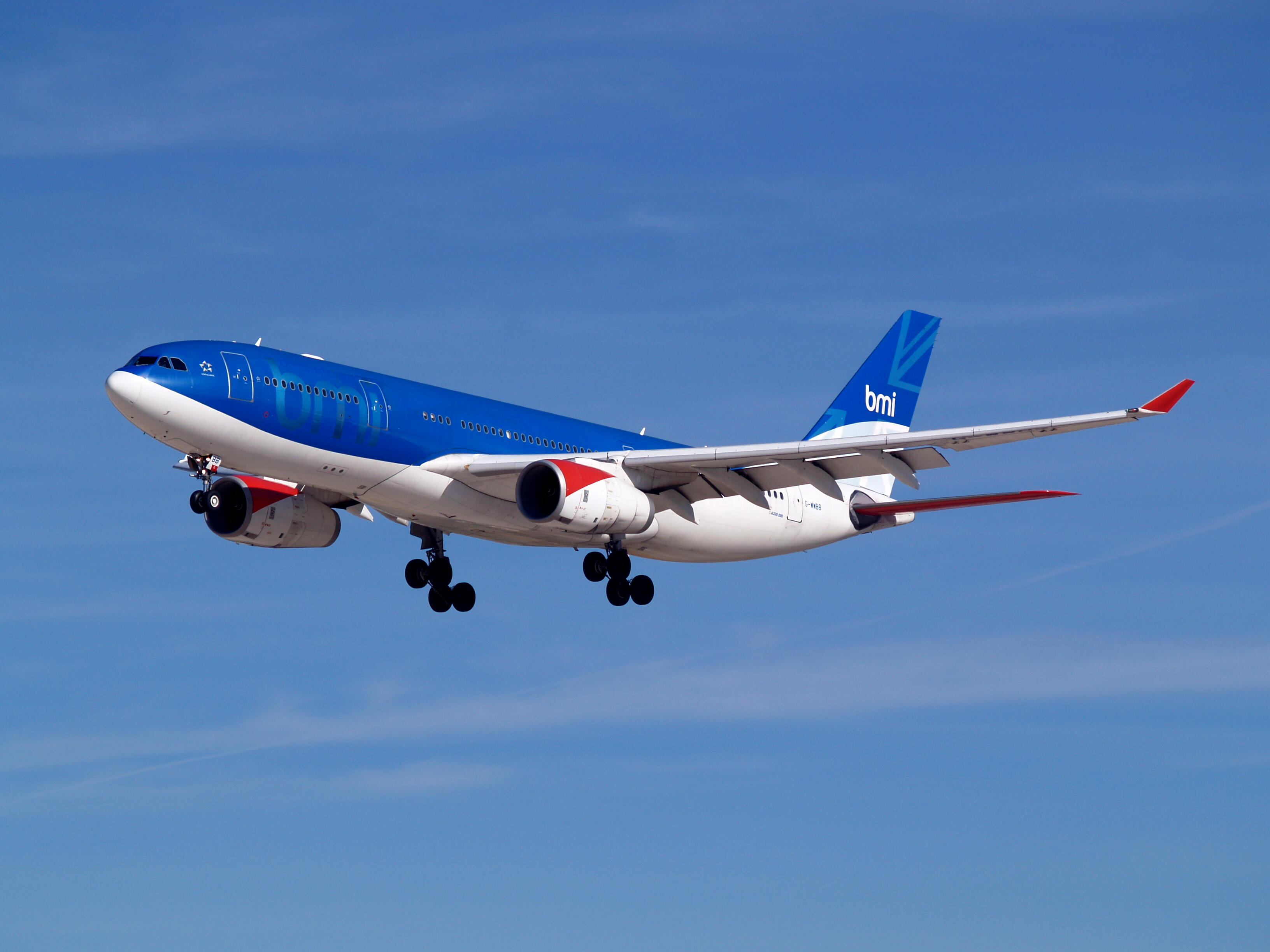 bmi Airbus A330-243 G-WWBB.